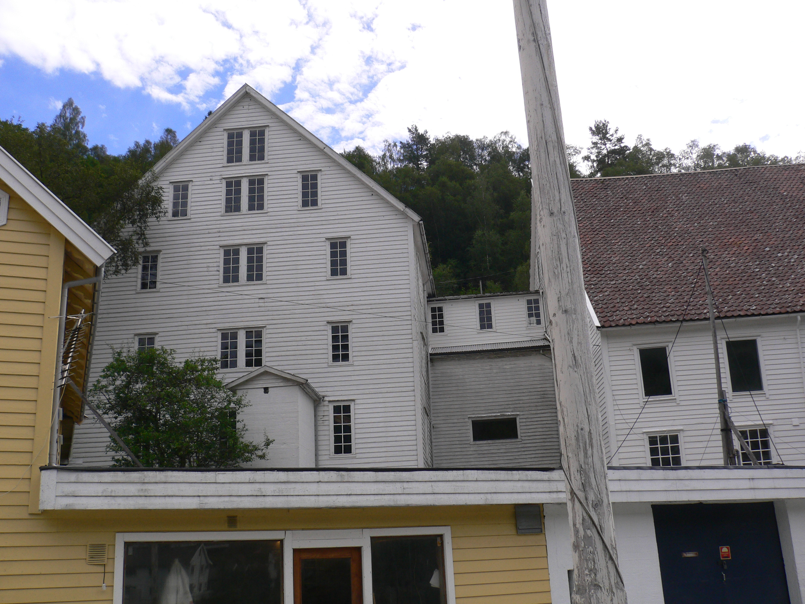 Bjørsvik kraftverk